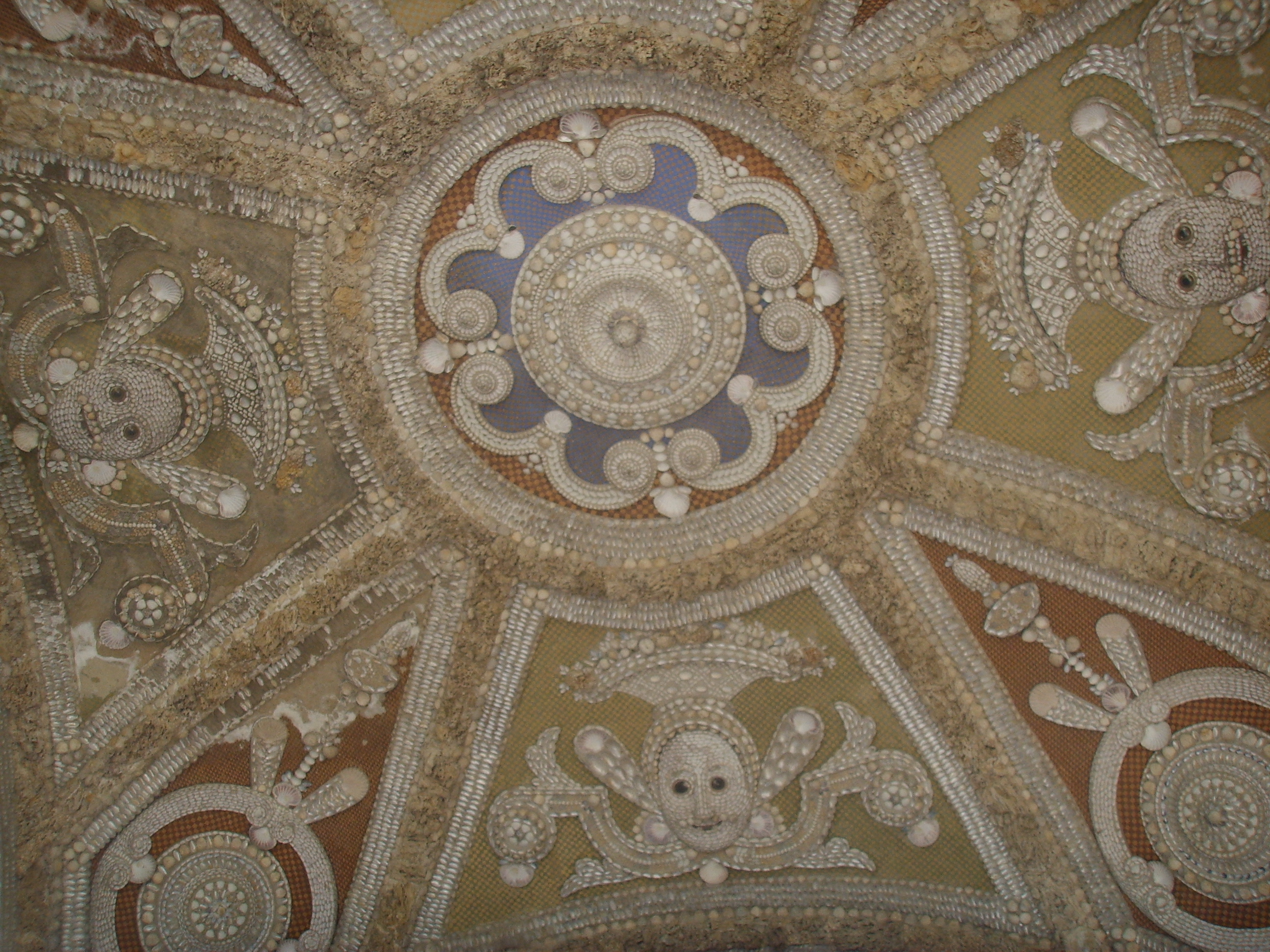 Parco di Villa Reale di Castello (Villa di Castello) Grotta degli animali by Giambologna in Florence Italy